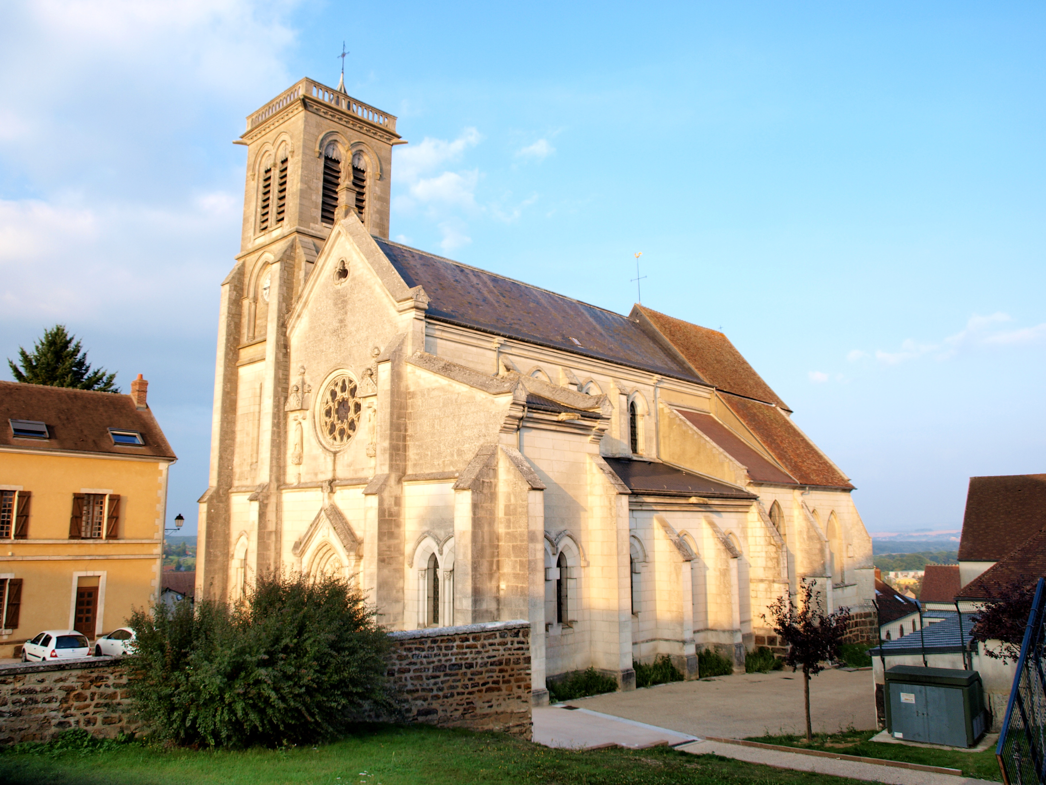 Église Saint-Serge de Pourrain (Yonne, France)